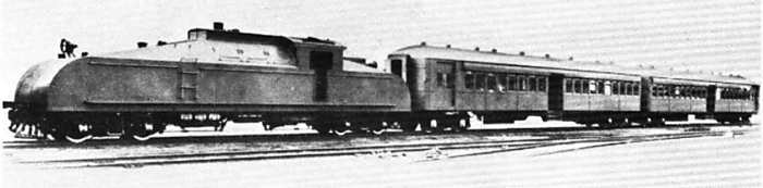 Locomotora Sentinel Cammell